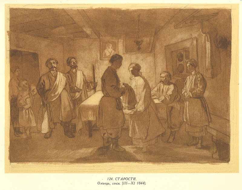 Старости.